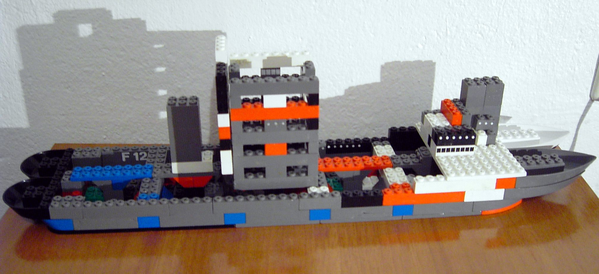 Barco fabricado con diversas piezas de la marca comercial Tente.